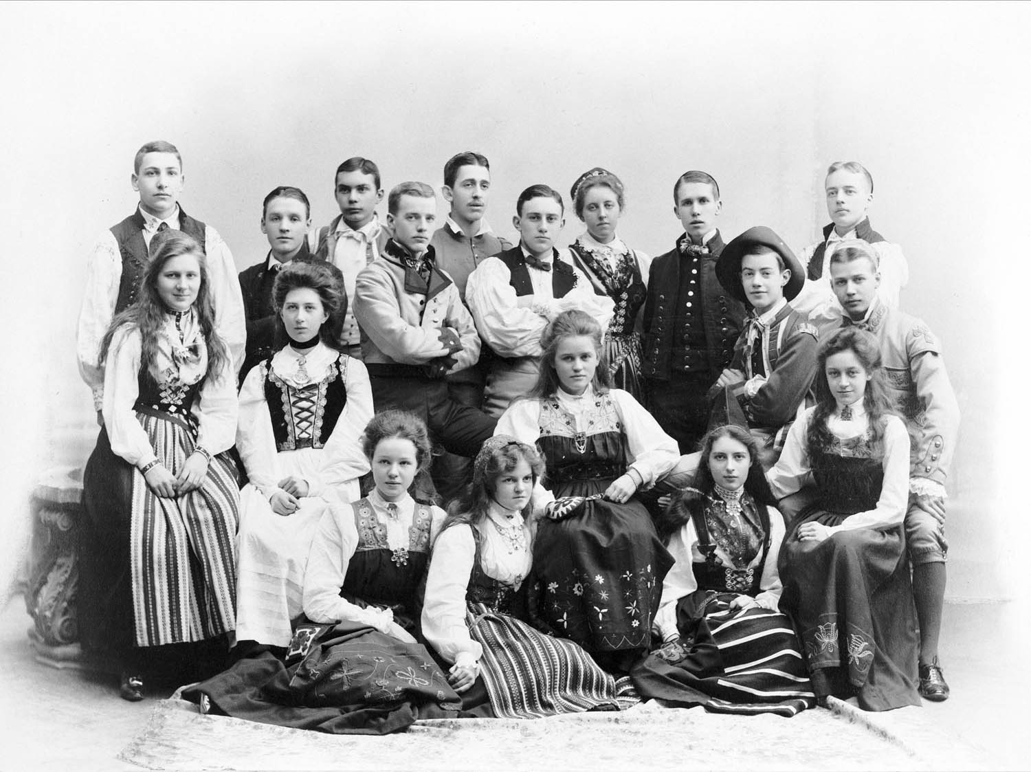 Folkdanslag. Grupporträtt av ungdomar i folkdräkter